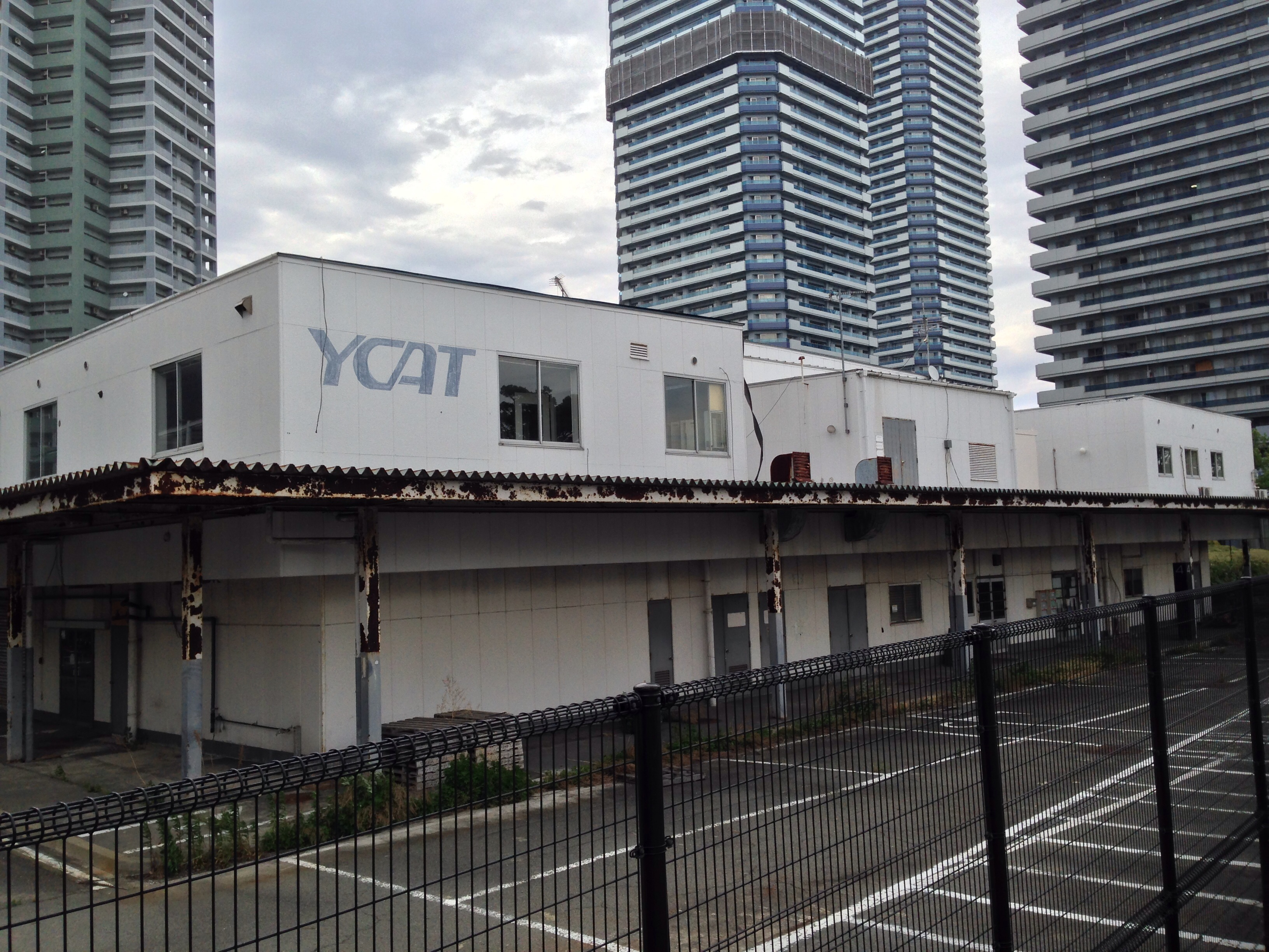 かつてポートサイド地区に所在した横浜シティエアターミナル（YCAT）の建物。同施設は1996年9月に横浜スカイビル内に移転したが、その後も建物が残されている（2014年5月時点で現存、建物は2017年度に解体予定で跡地にはインターナショナルスクールが開校予定）。